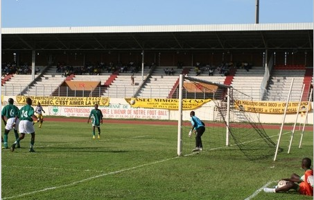 photo prise par Majestyjp lors au stade felicia lors d'un de ses bref sejours Abidjan